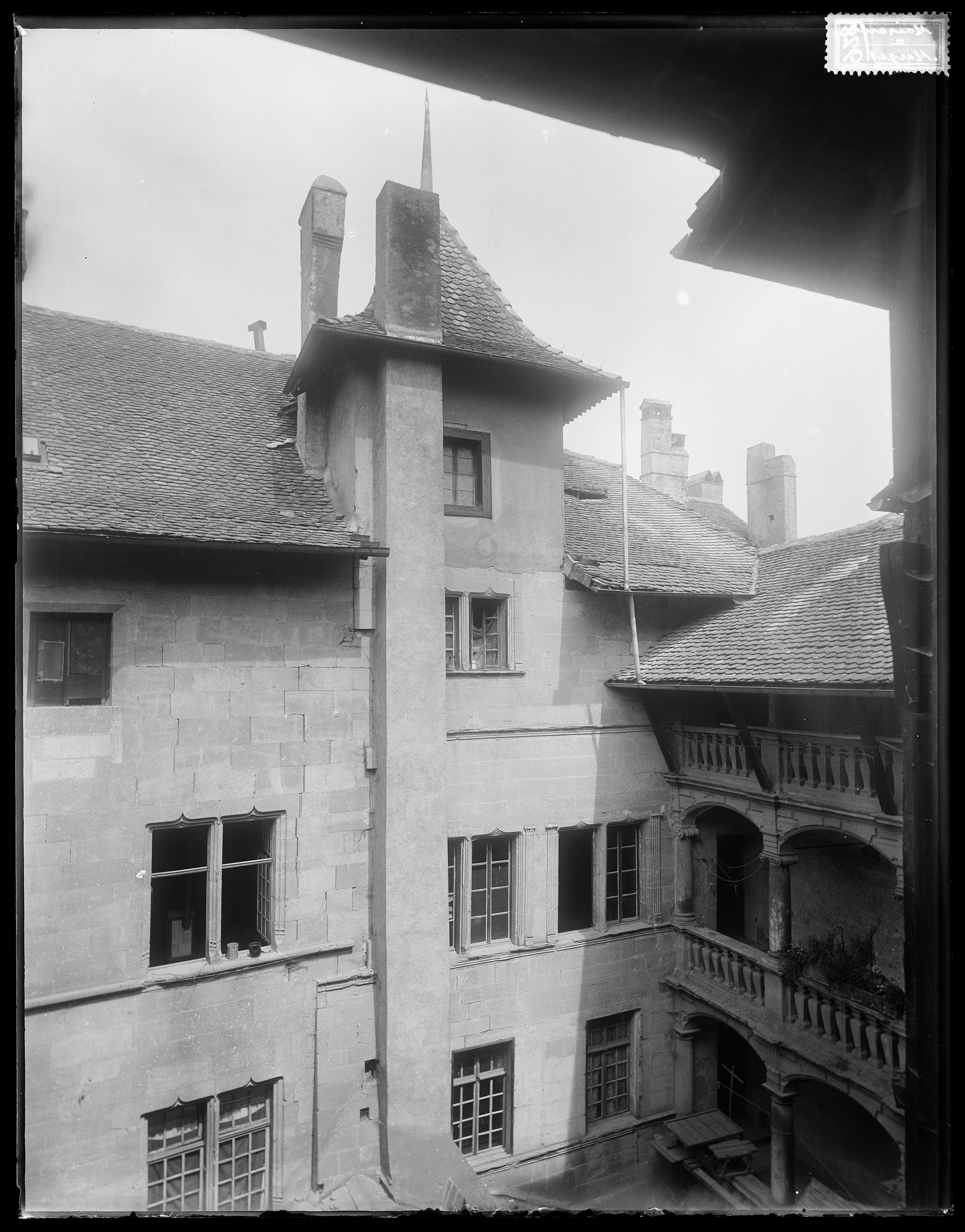 1 cliché de la cour et des galeries du bâtiment, auteur probable de la photographie : Max van Berchem, 1905.